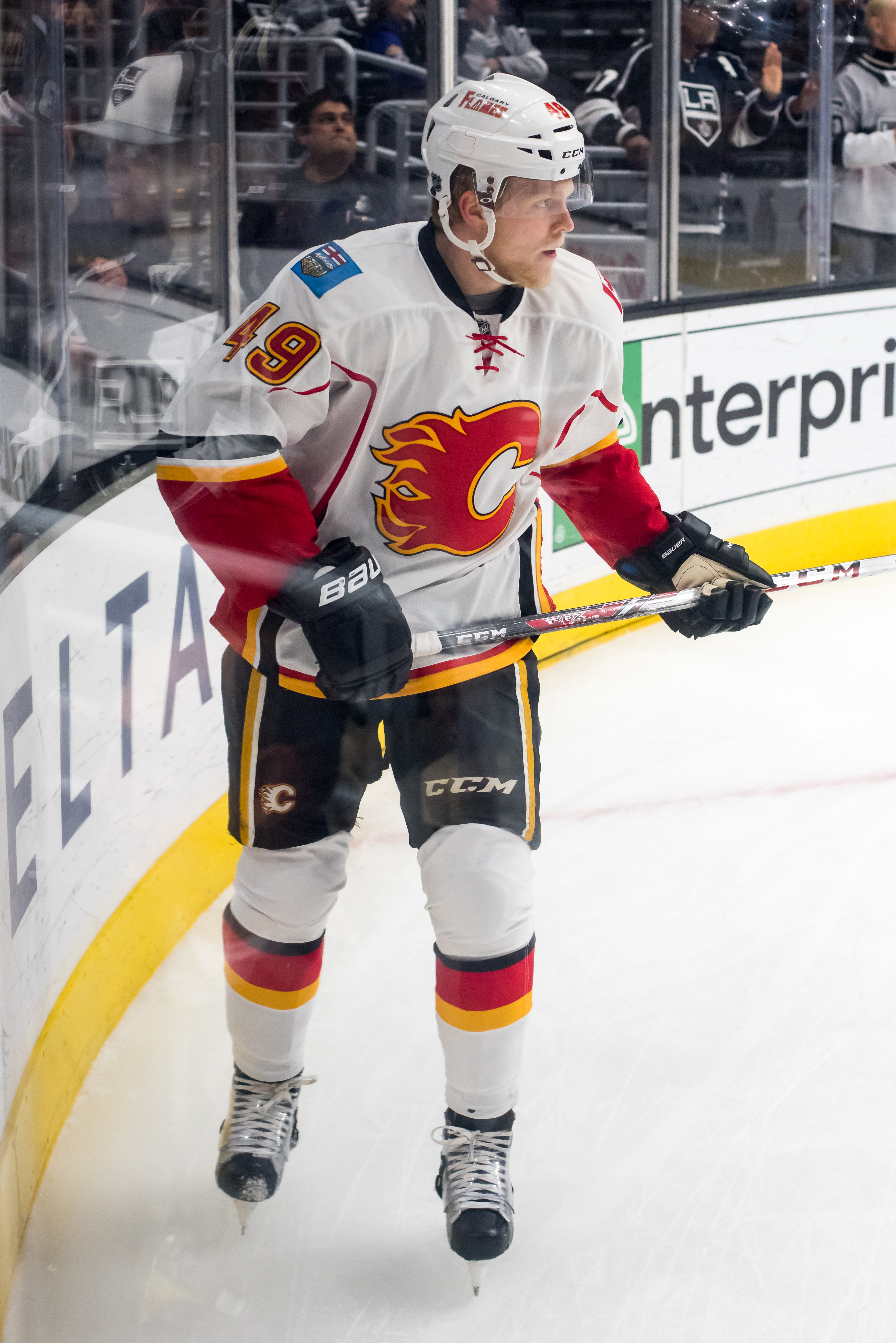 Hunter Shinkaruk